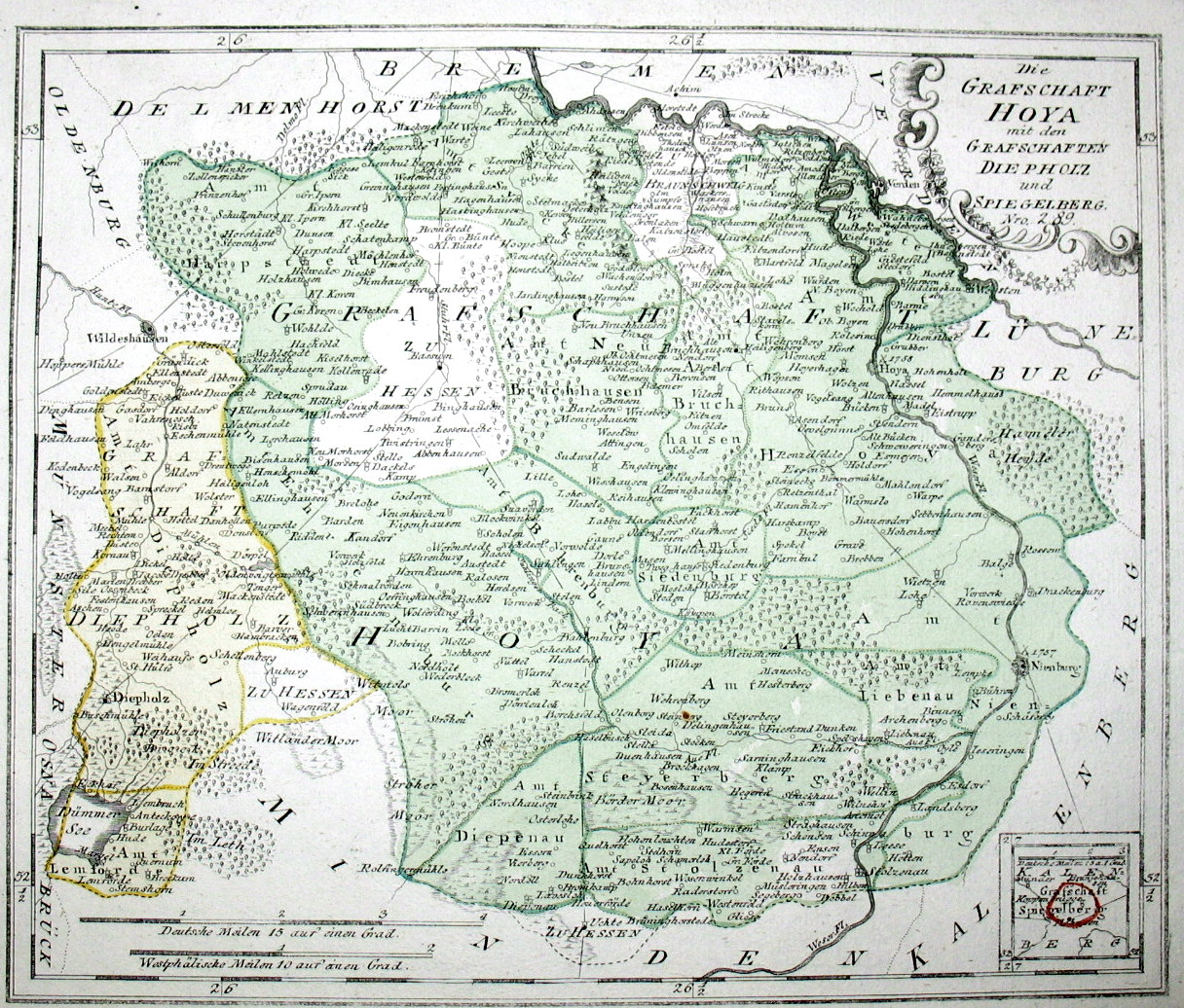 Die Grafschaft Hoya mit den Grafschaften Diepholz und Spiegelberg. Nro. 289. Kolorierter Kupferstich